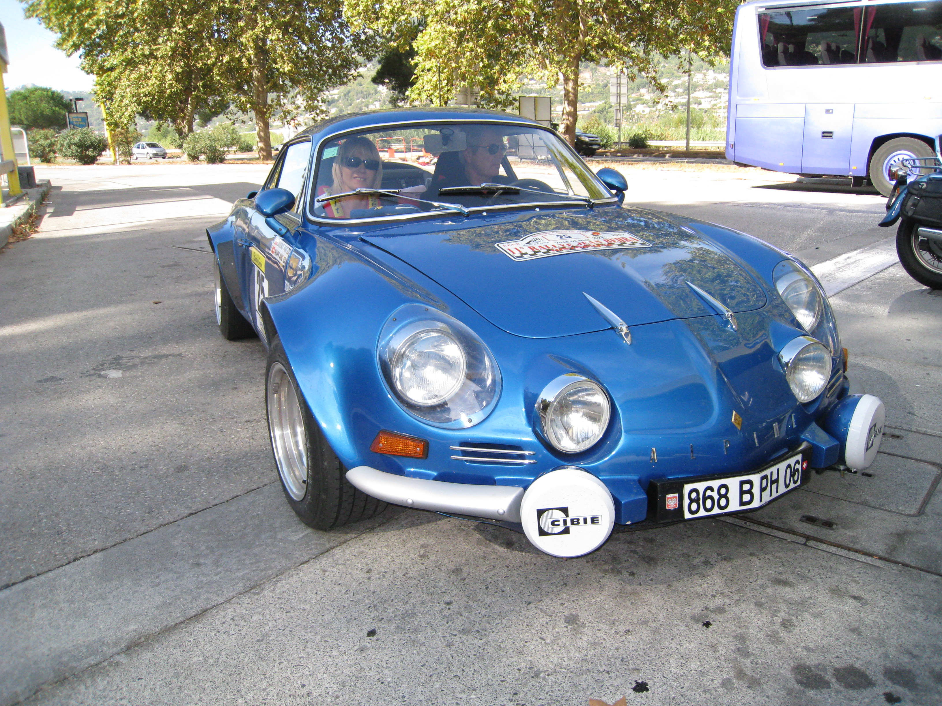 Alpine Renault A110 "Berlinette"